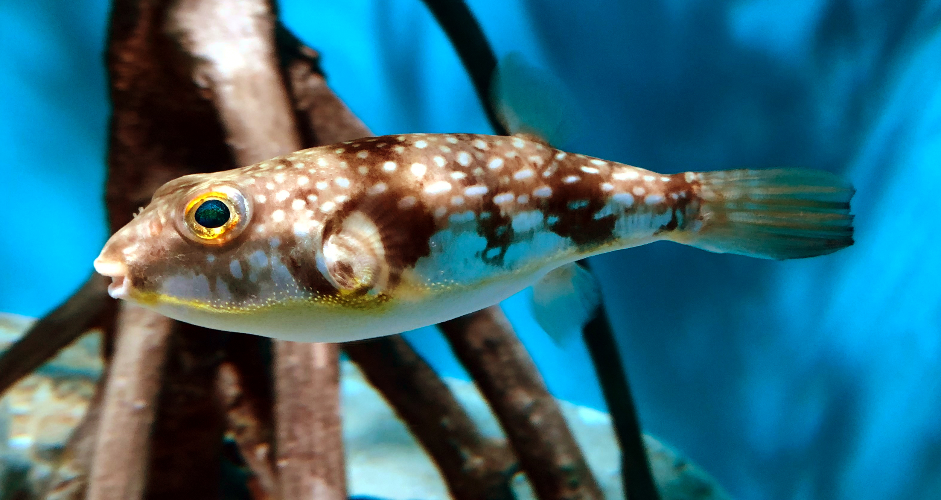 オキナワフグ。サンシャイン水族館飼育個体。